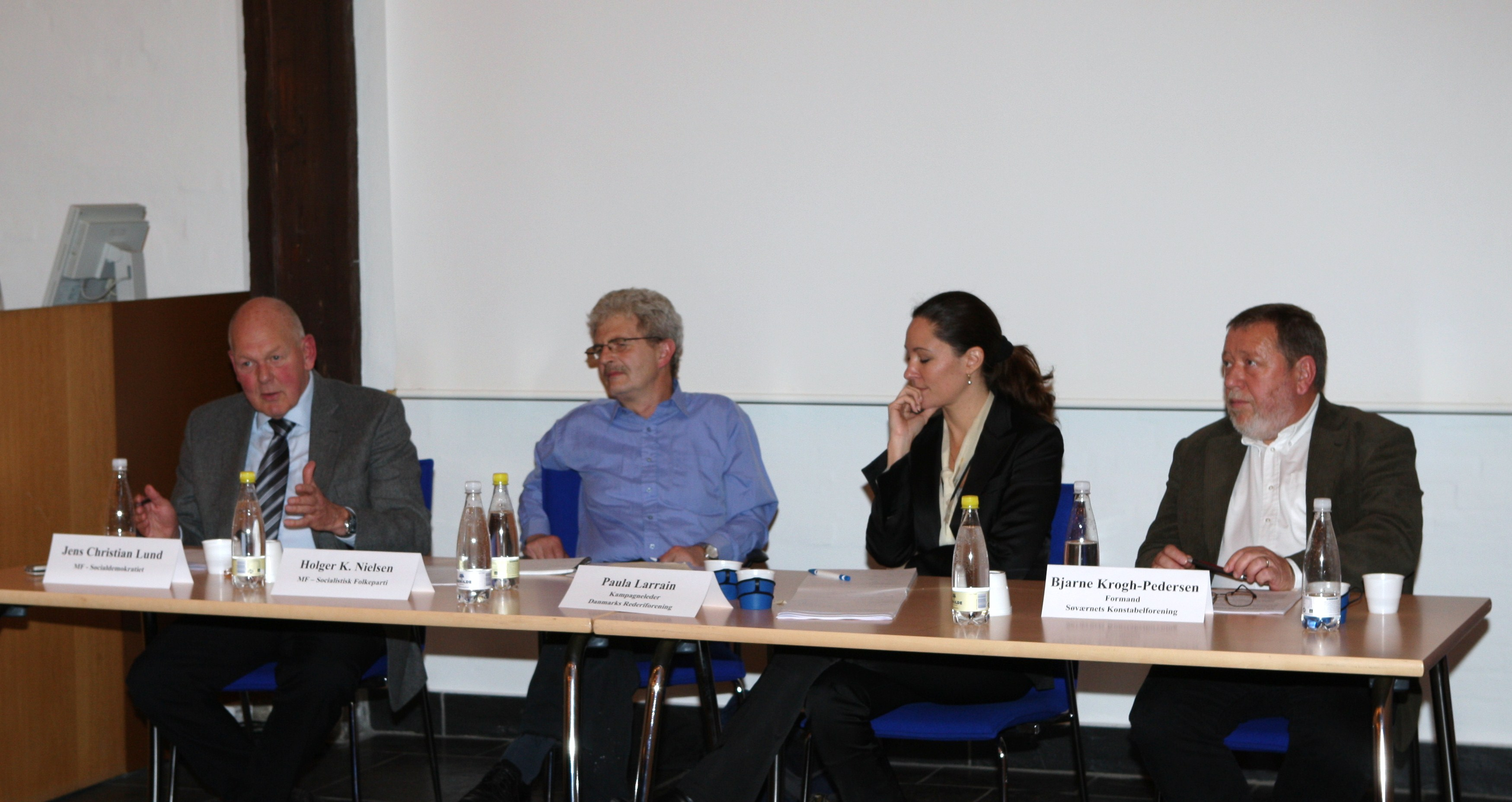 Konference holdt af Søværnets Konstabelforening på Kastellet i København november 2008. Fra venstre: MF Jens Christian Lund, MF Holger K. Nielsen, Journalist Paula Larrain, Formand Bjarne Krogh-Pedersen